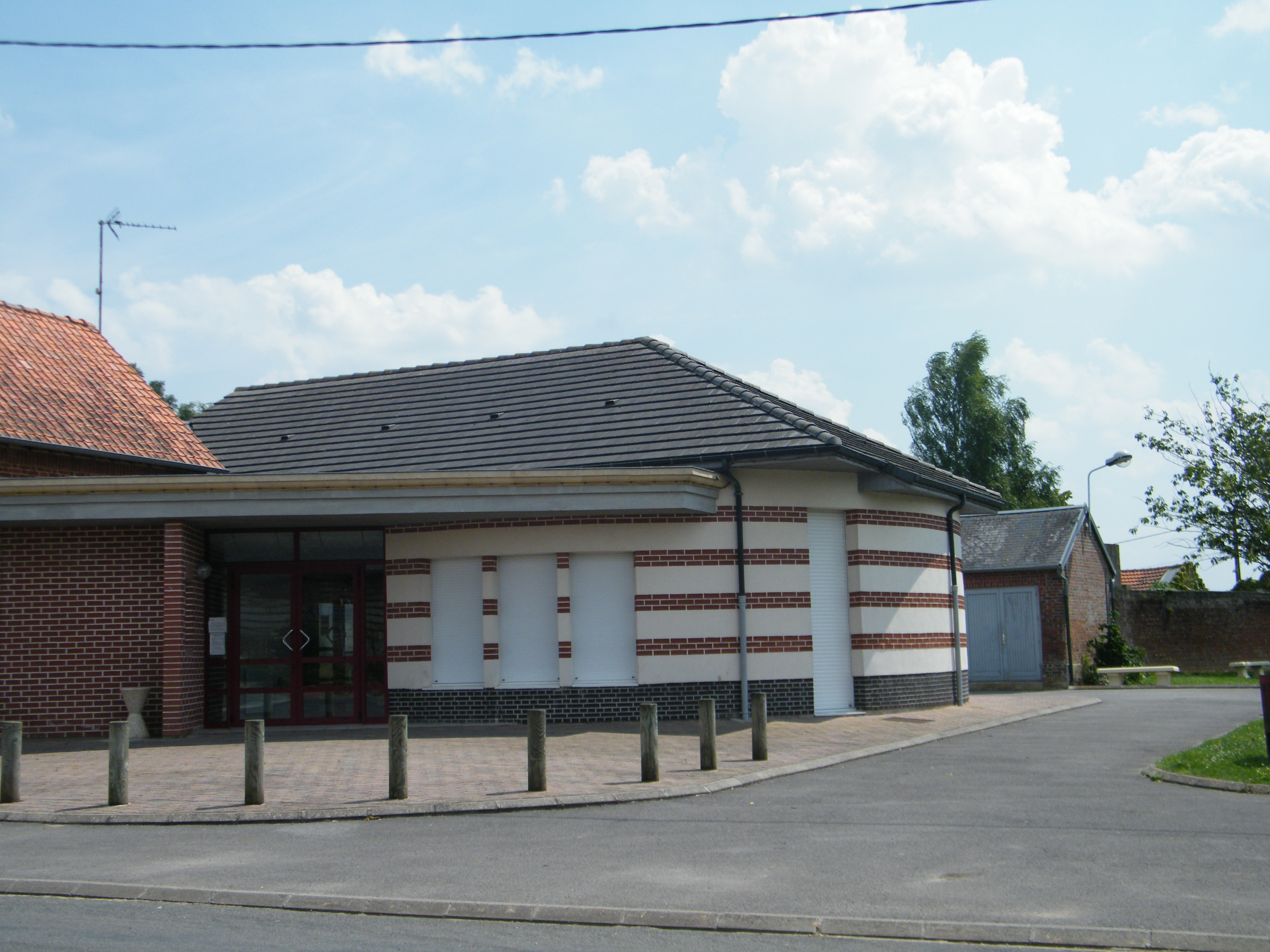 Salle communale.